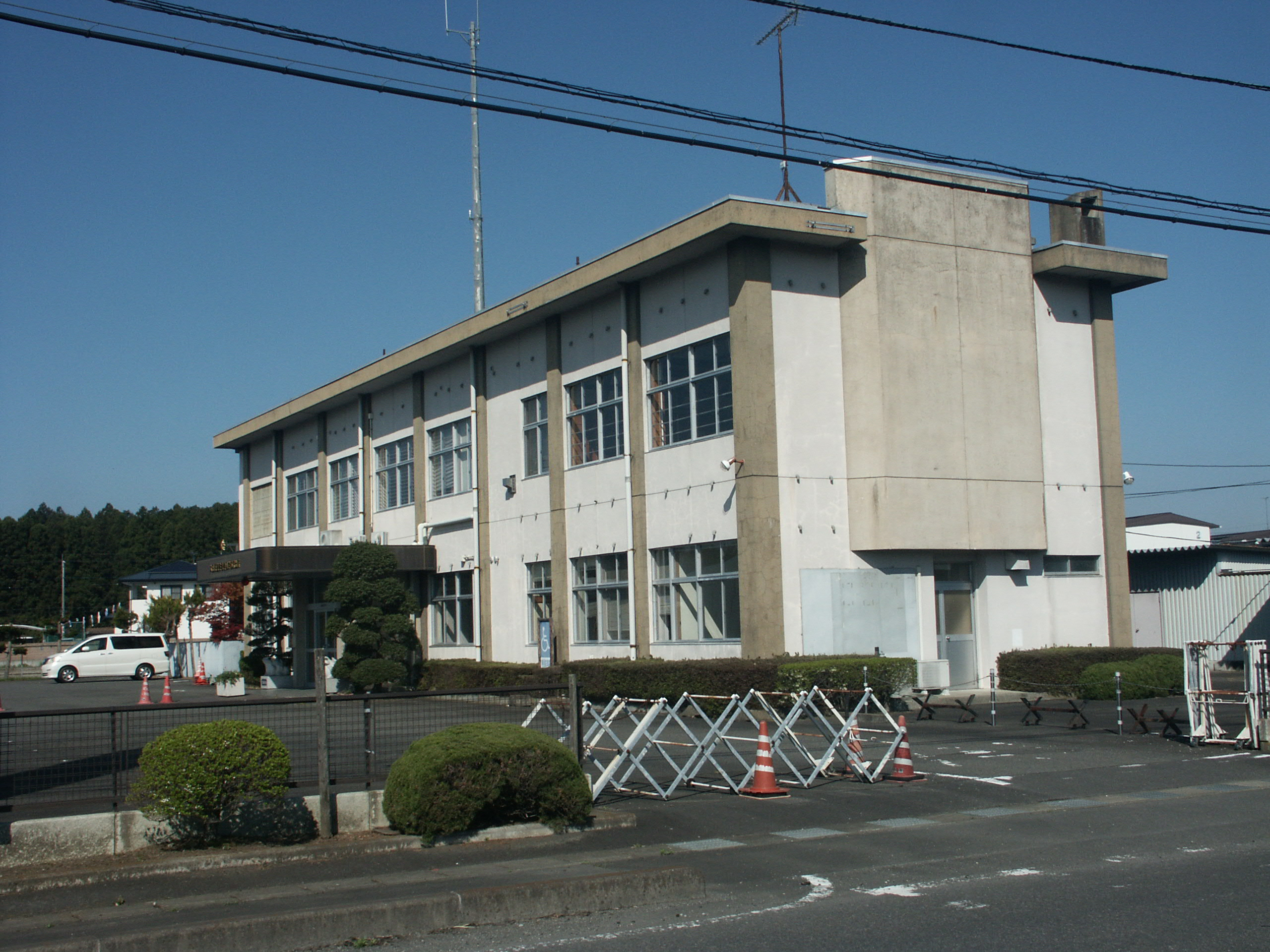 大田原警察署黒羽幹部派出所（旧黒羽警察署）庁舎